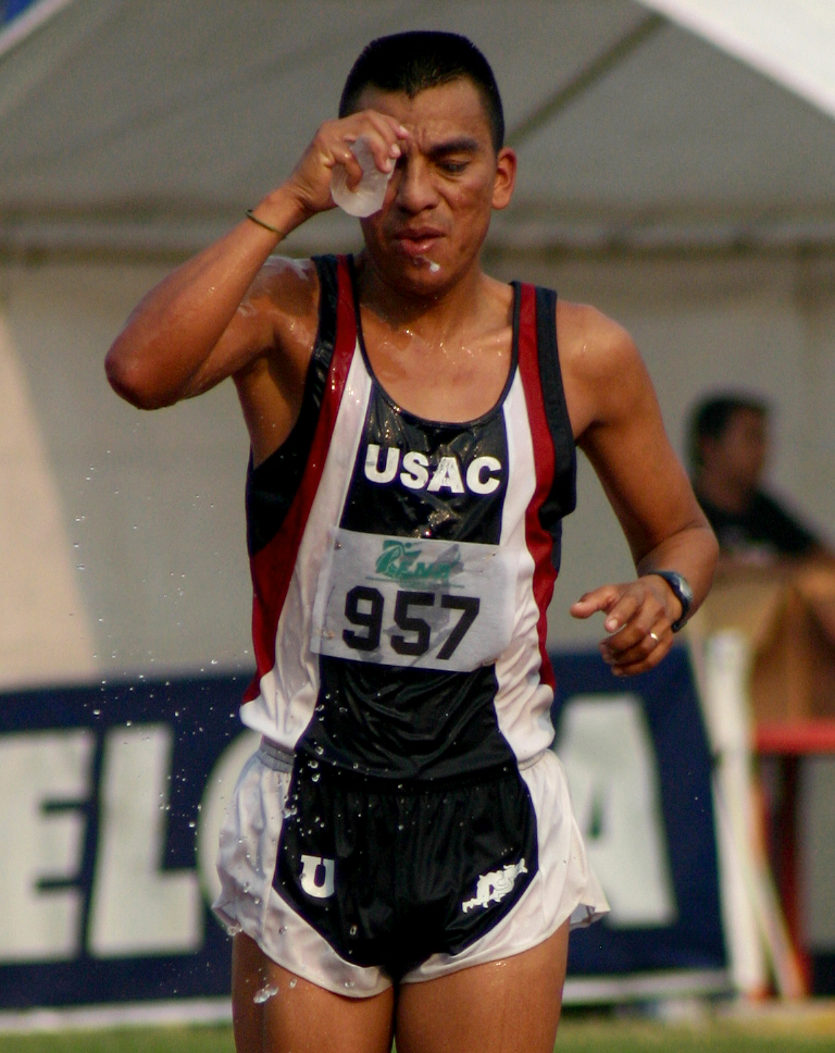 Julio René Martínez Sicán, oriundo de Fraijanes, pasó a la historia del atletismo mundial al detener los cronómetros en 1hora 17 minutos y 46 segundos el 8 de Mayo de 1999 en la copa de Europa de marcha en Eisenhüttenstadt, Alemania, en la especialidad de 20 kilómetros marcha. Entre los logros de de Martínez se cuentan triunfos y posiciones honrosas en Campeonatos Centroamericanos, Centroamericanos y del Caribe, Iberoamericanos y Campeonatos Mundiales.